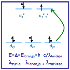 (Cu(H2O)6)-ren d orbitalen maila berrien arteko energia desberdintasuna